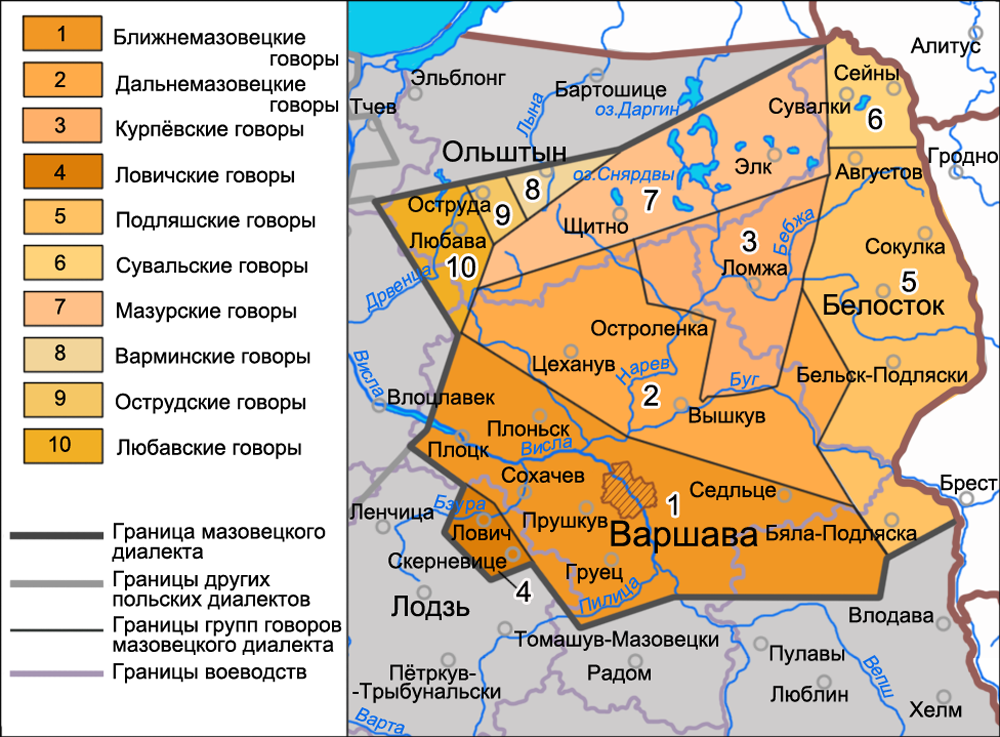 Карта распространения говоров мазовецкого диалекта. На основе карты С Урбанчика (с ловицкими, любавскими, острудскими и варминскими говорами): Urbańczyk S. Zarys dialektologii polskiej. Wydanie trzecie. Warszawa, 1968 Gwary polskie. Przewodnik multimedialny pod redakcją Haliny Karaś. Dialekt mazowiecki